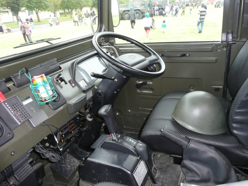 Type 73 chugata truck.立川防災航空祭にて。